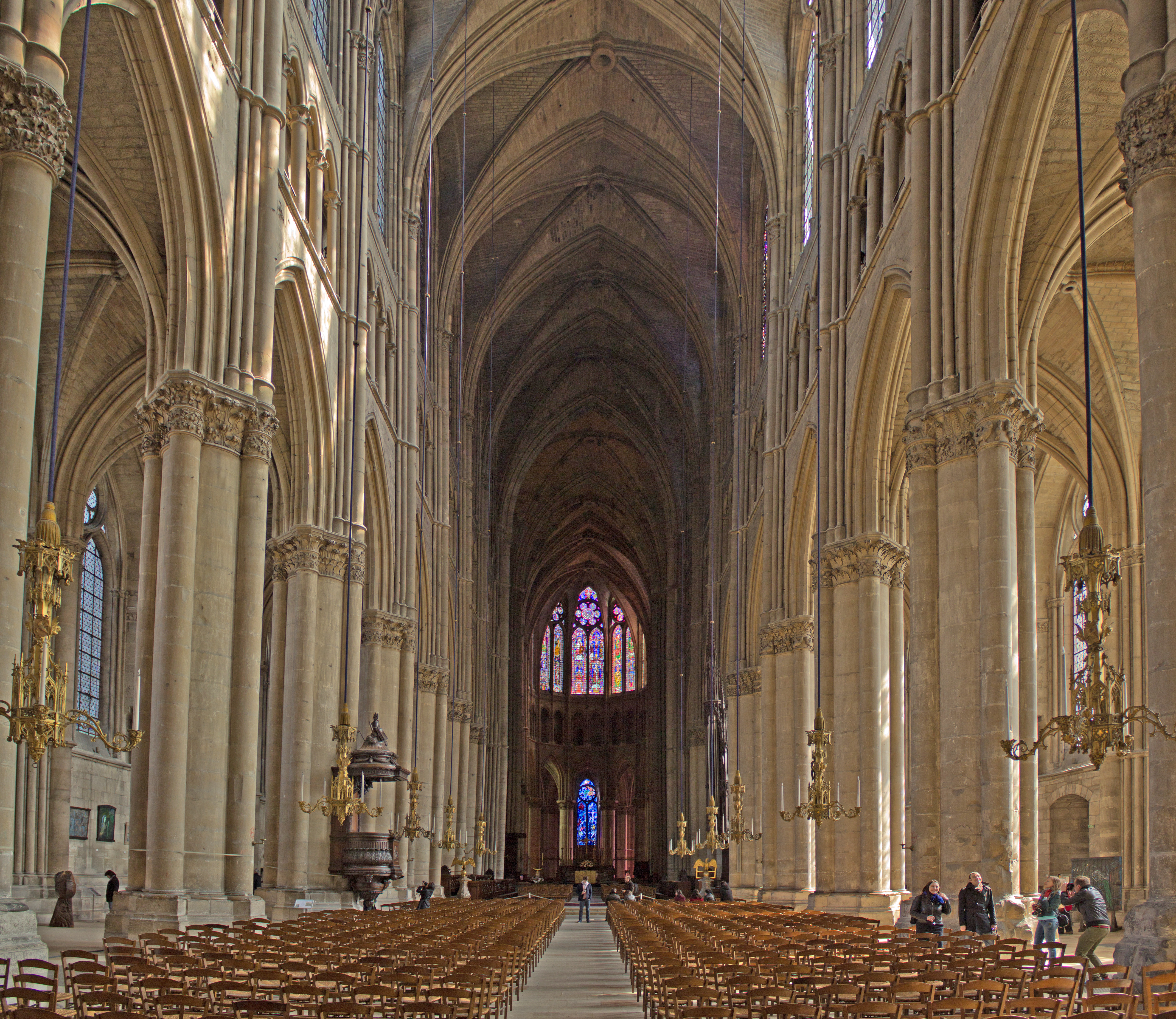 Cathédrale Notre-Dame de Reims .